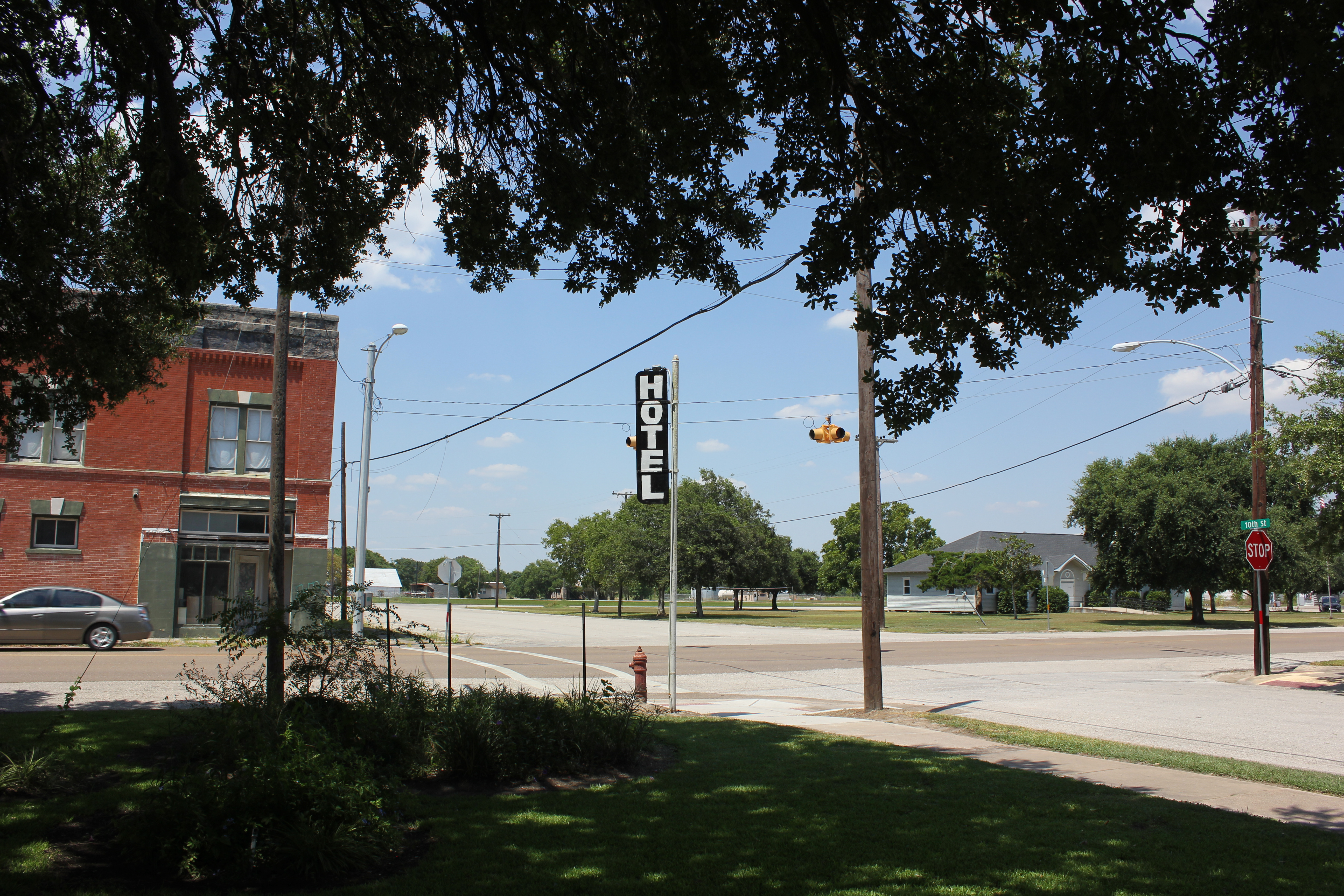 Signs